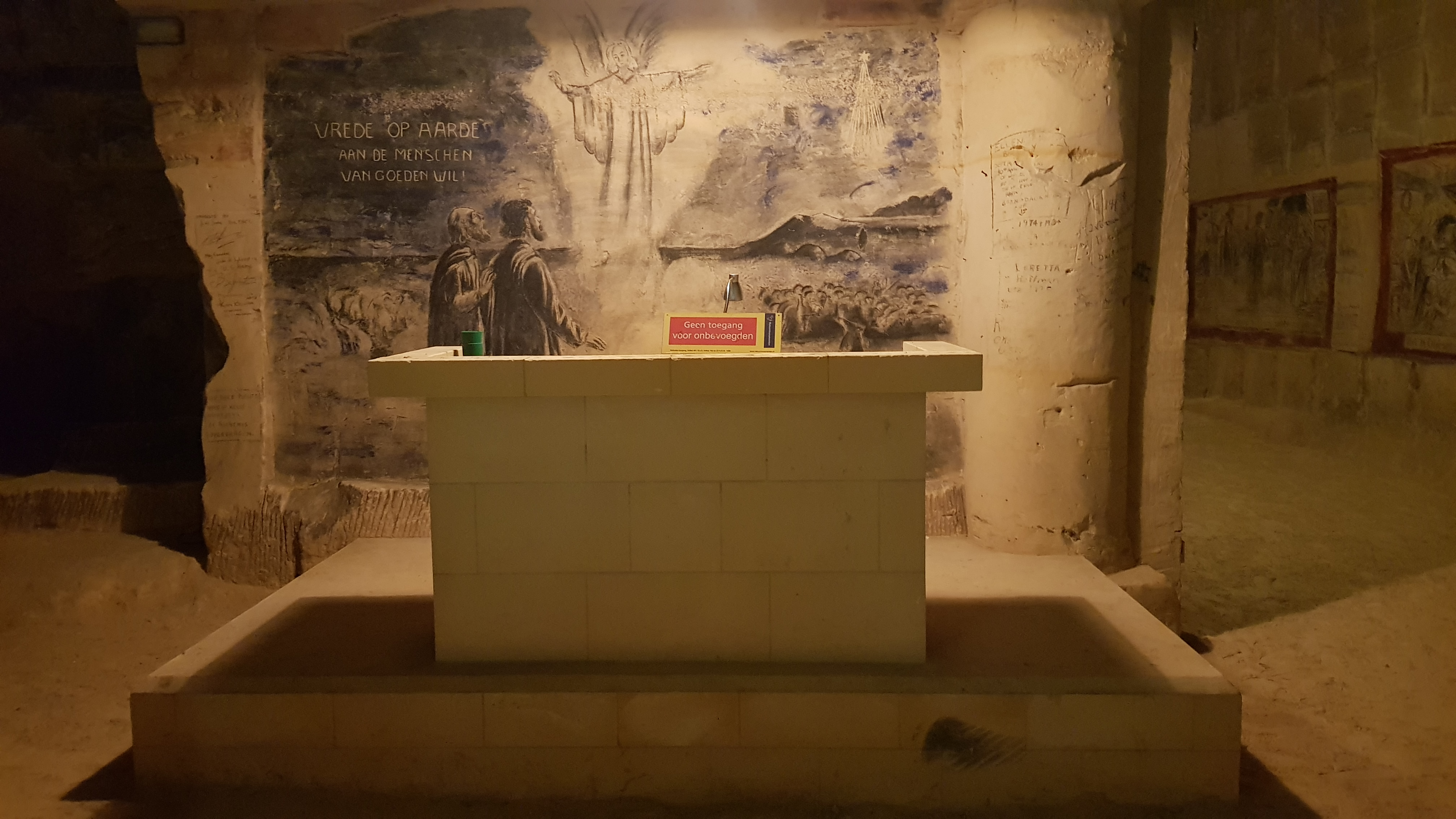 Groeve de Schark, Maastricht, Nederland